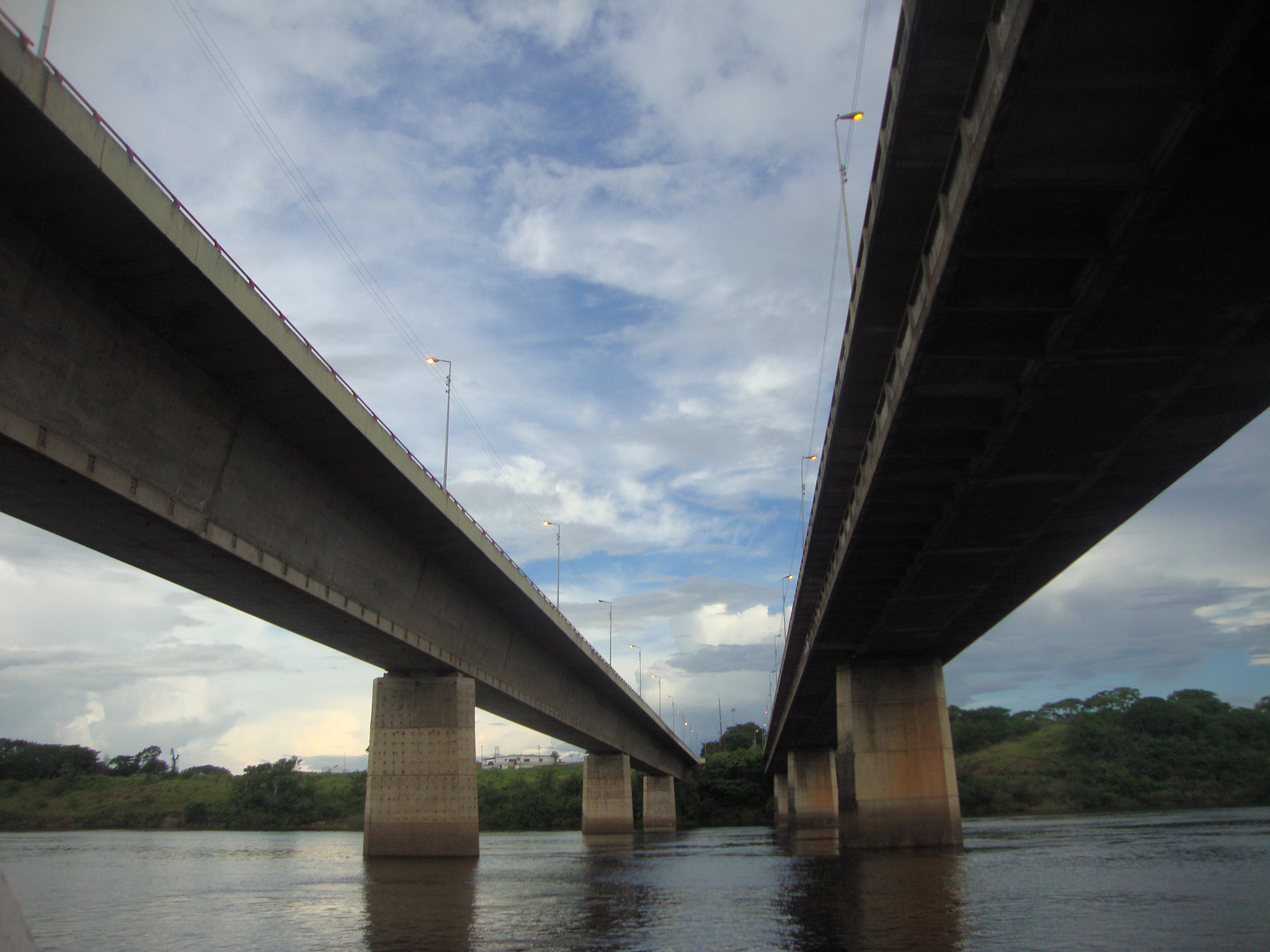 Primer y Segundo Puente sobre el Río Caroní visto por debajo.